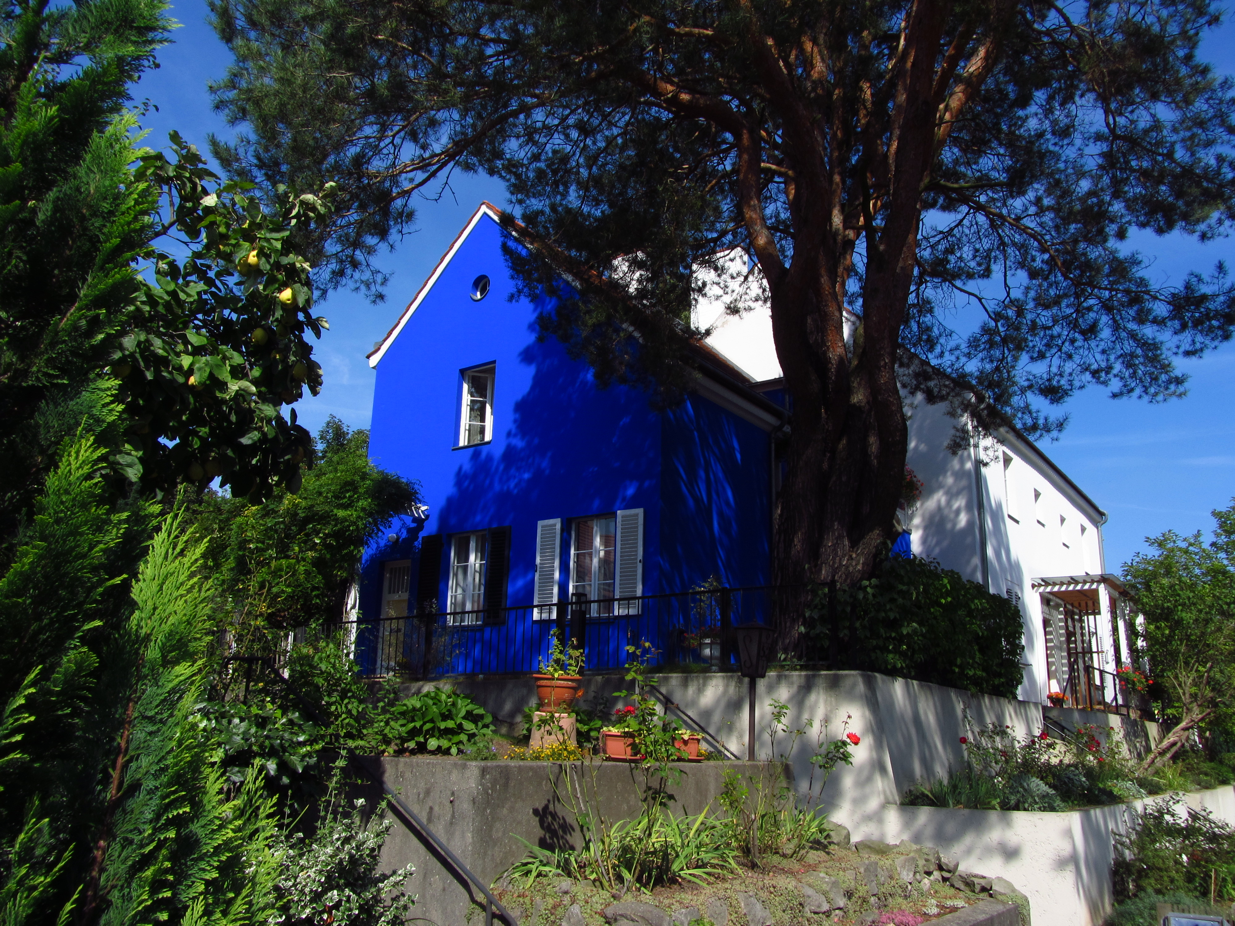 Das blaue Haus, Tuschkastensiedlung von Bruno Taut